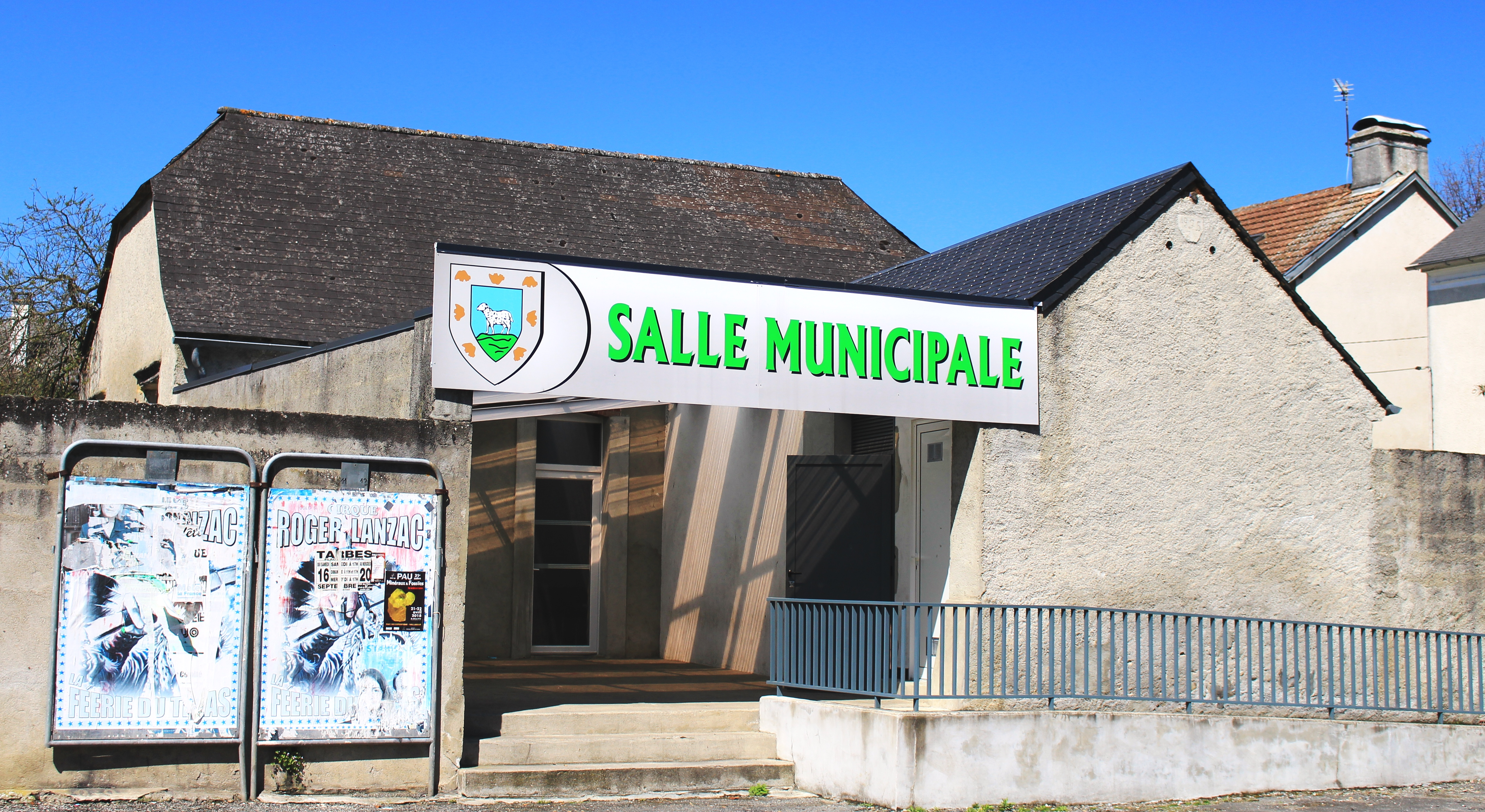 Salle des fêtes de Lamarque-Pontacq (Hautes-Pyrénées)